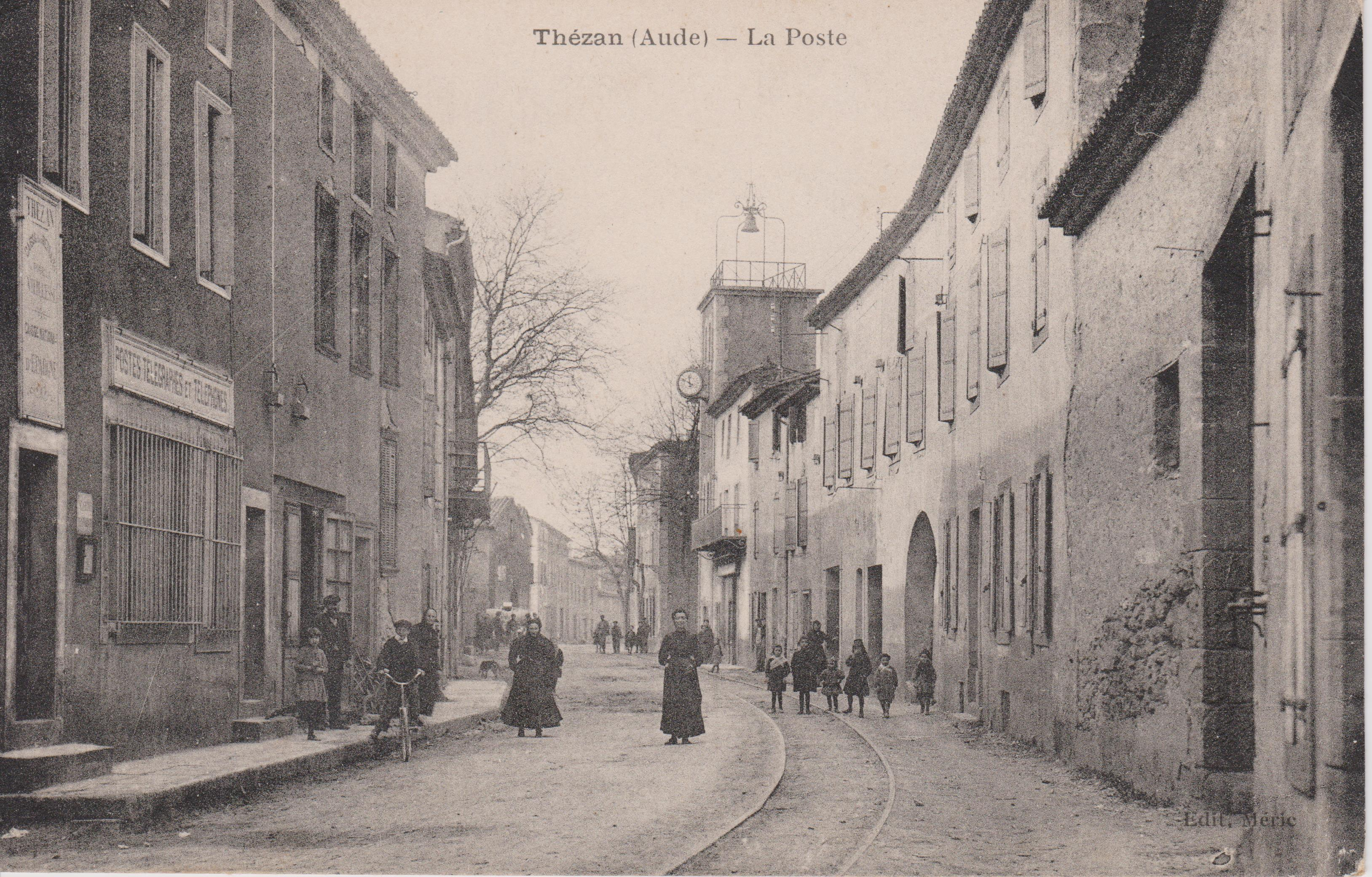 L'ancienne route nationale 611 à Thézan-des-Corbières, avec à gauche la Poste et au fond le Beffroi de la Couverte.